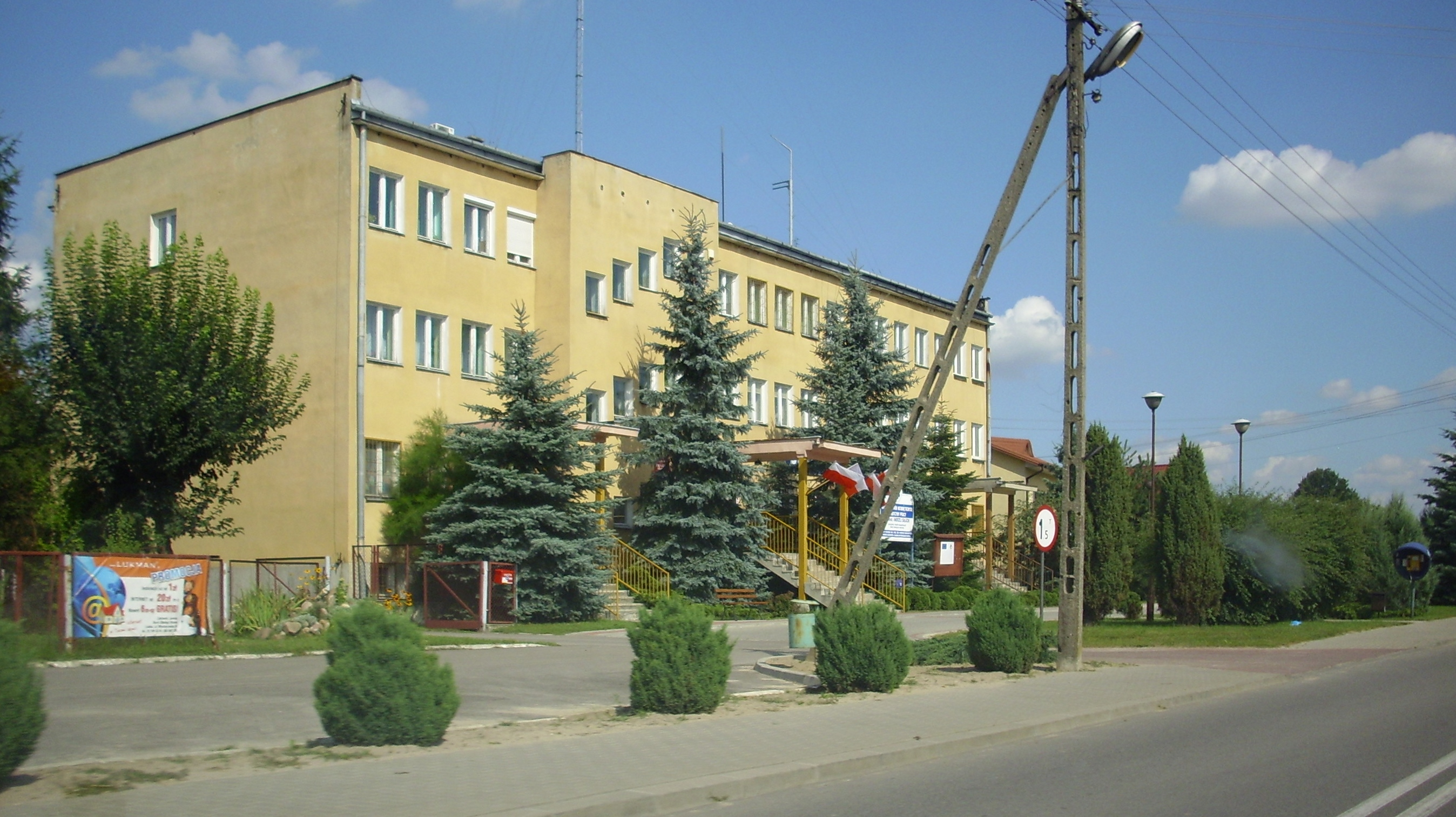 Serokomla (pow. łukowski, woj. lubelskie, Polska). Urząd Gminy.